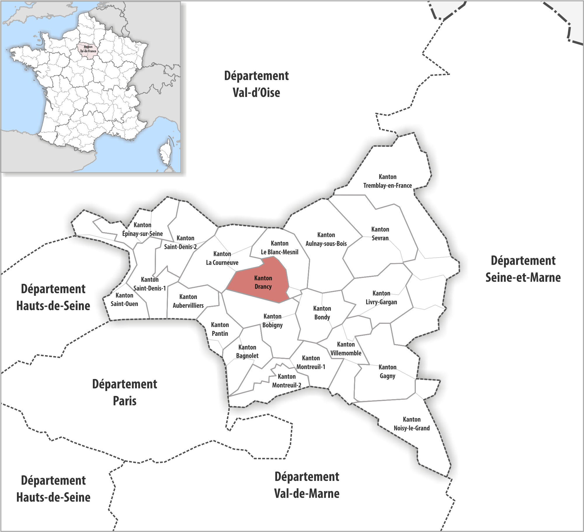 Lage des Kantons Drancy